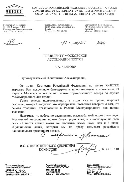 Благодарность Бюро ЮНЕСКО Константину Кедрову за Первый день поэзии ЮНЕСКО в России